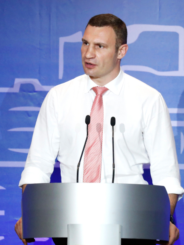 Голова Асоціації міст України Віталій Кличко на святкуванні 25-річчя Асоціації міст України